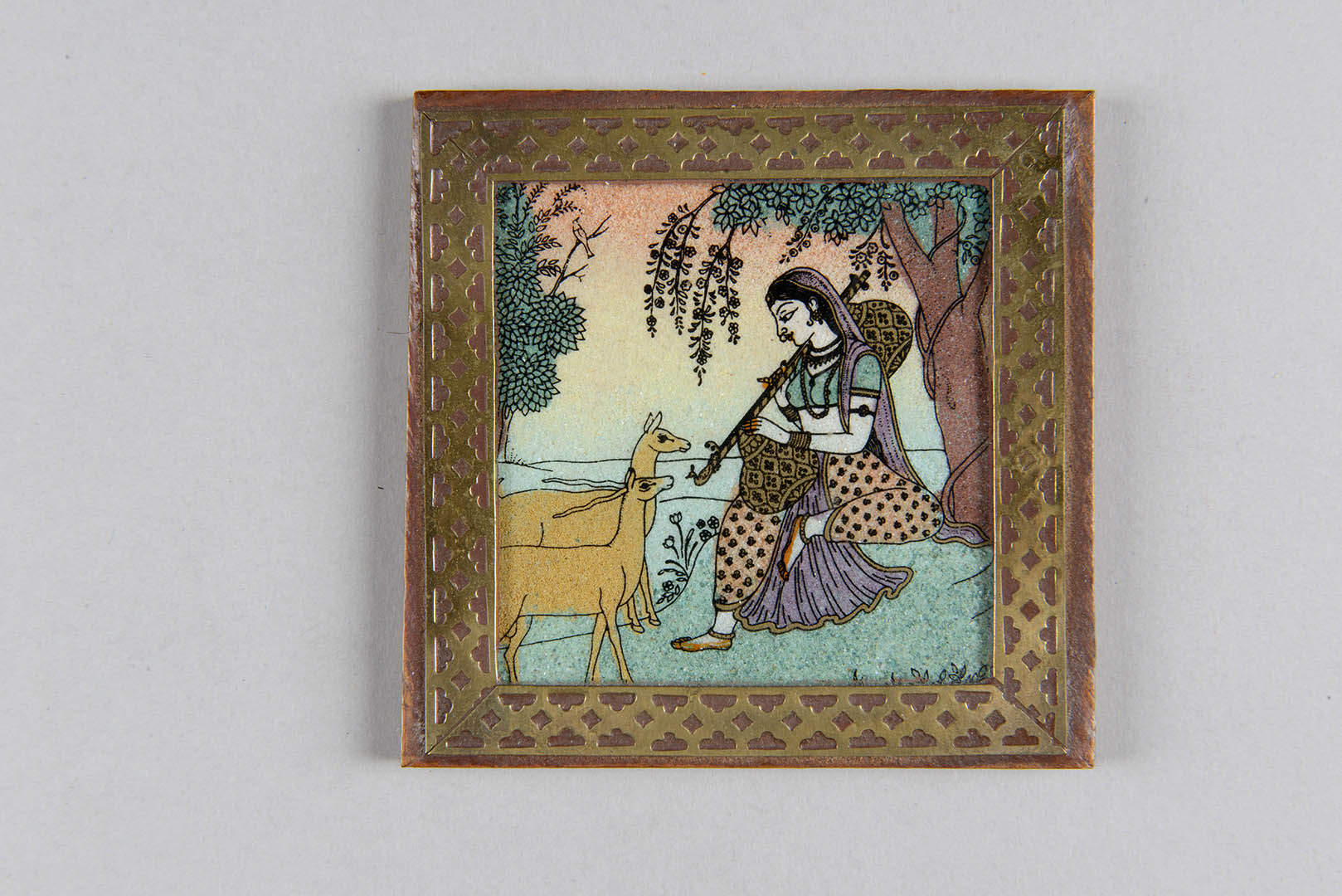 Przedstawień w typie Todi ragini z cyklu ragamala (girlanda dźwięków). Przedstawienie nawiązuje do stylu miniatur z Radźastanu (XVII w.). Ragini Todi była żoną Ragi Dipaki. Przedstawiana jest jako młoda dziewczyna w kwiecie wieku, zapatrzone w nią jelonki symbolizują kochanków podziwiających jej piękno. Obrazki nawiązują do popularnego motywu w malarstwie miniaturowym - ragamala (girlanda dźwięków). Cykl ten składa się z 36 typów przedstawień nazywanych raga (6 typów) i ragini (po pięć do każdej ragi, w sumie 30 typów). Każdy typ przedstawienia ilustruje inną emocję.